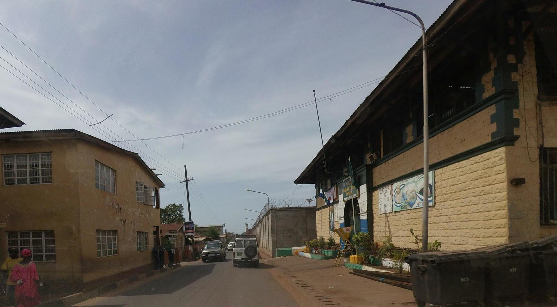 Pademba Road Prison, Sierra Leone